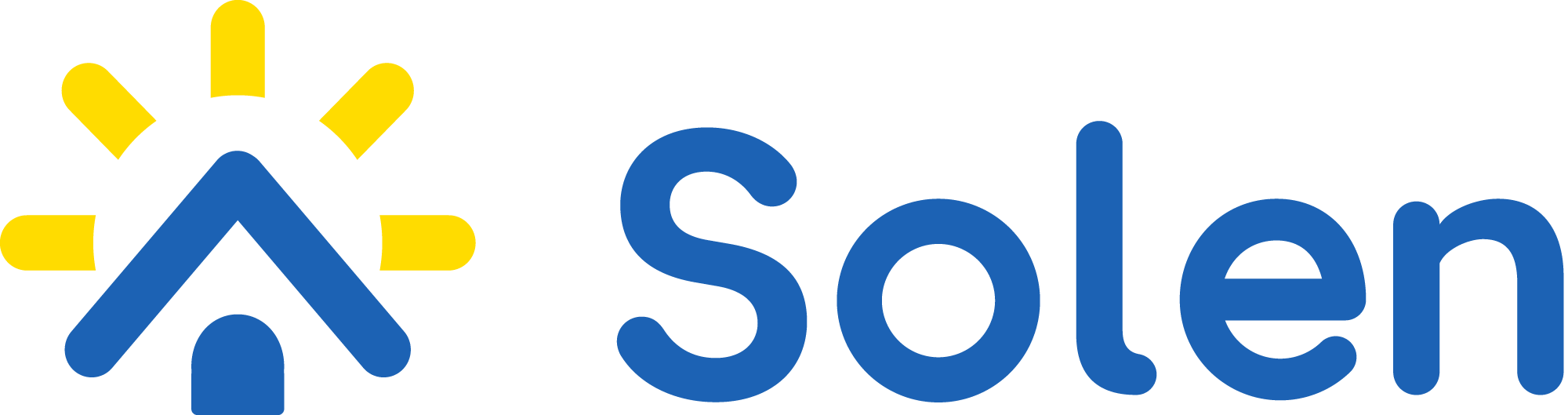 logo de la start-up Solen France